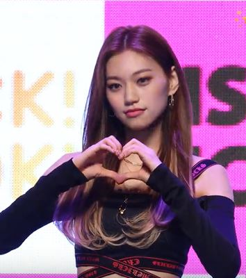 10월 11일 오후 서울 용산구 블루스퀘어에서 첫 번째 싱글 앨범 'KISS, KICKS' 발매 프레스 쇼케이스를 가졌다.